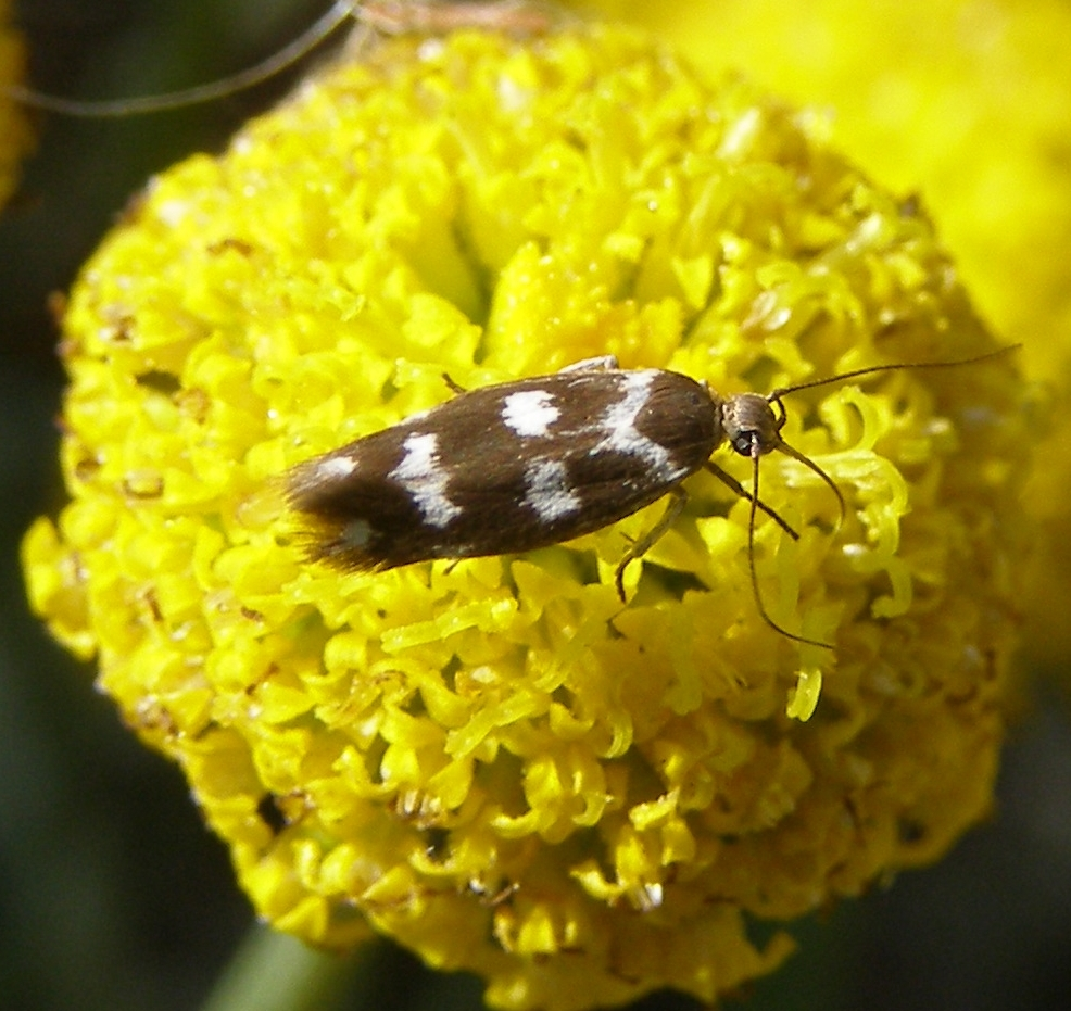 Scythris scopolella (Linnaeus 1767), Scythididae, Gelechioidea